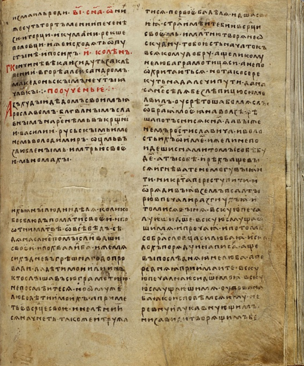 Сторінка з "Повчання Володимира Мономаха"